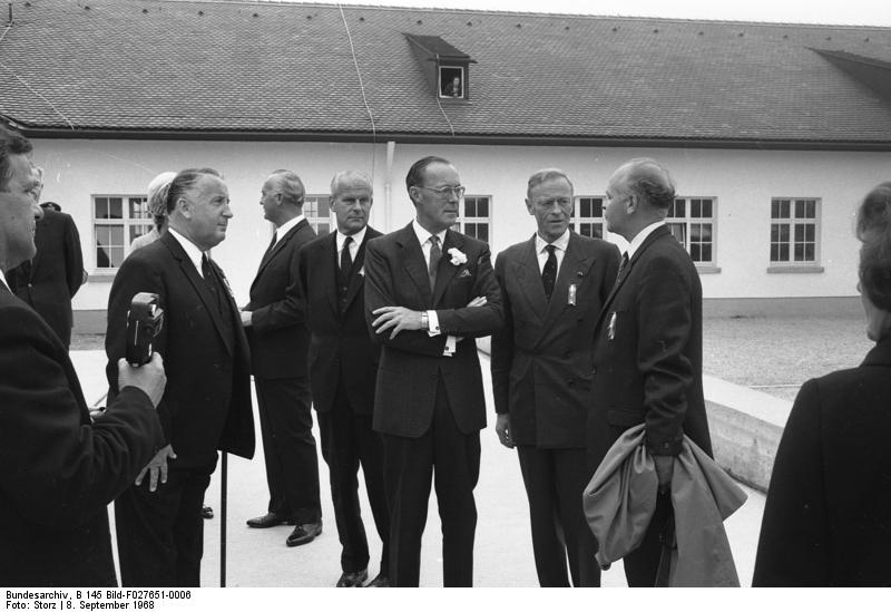 Einweihung des Mahnmals des jugoslaw. Bildhauers Glid Nandor im ehemaligen KZ Dachau Mitte: Prinz Bernhard d. Niederlande